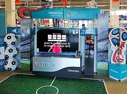 Exemple de mise mise en place Hisense à Boulanger Sarcelles